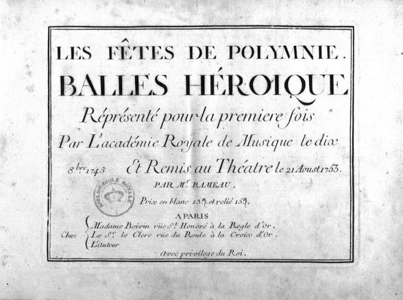 Page de titre des Fêtes de Polymnie de Jean-Philippe Rameau